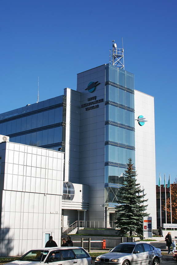 Rytų skirstomieji tinklai headquarters in Žirmūnai, Vilnius.